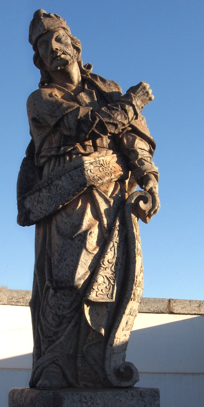 Profeta Ezequiel - Doze profetas de Aleijadinho Congonhas Minas Gerais